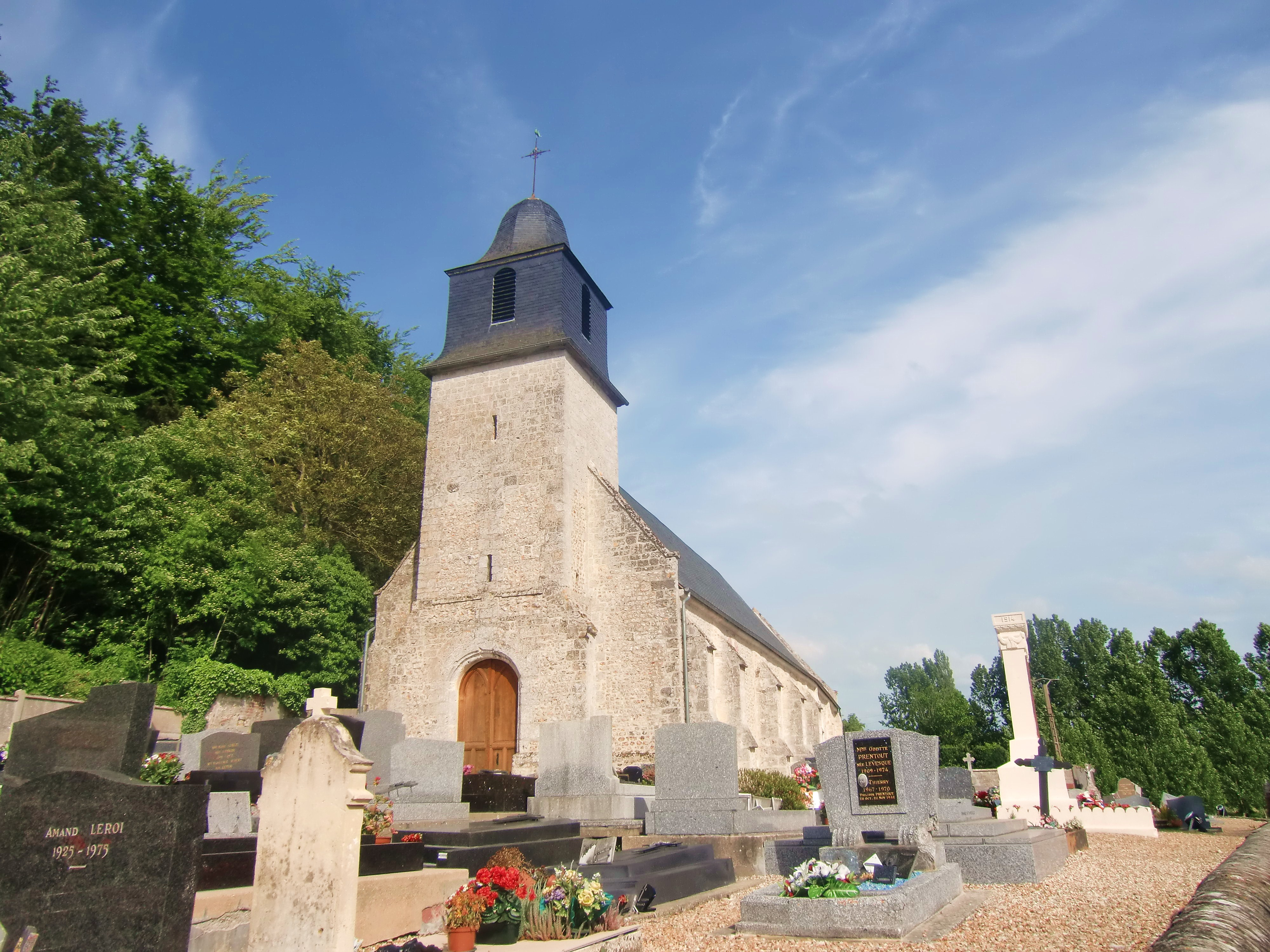 église de Saint-Pierre-du-Val (Eure, Normandie, France)